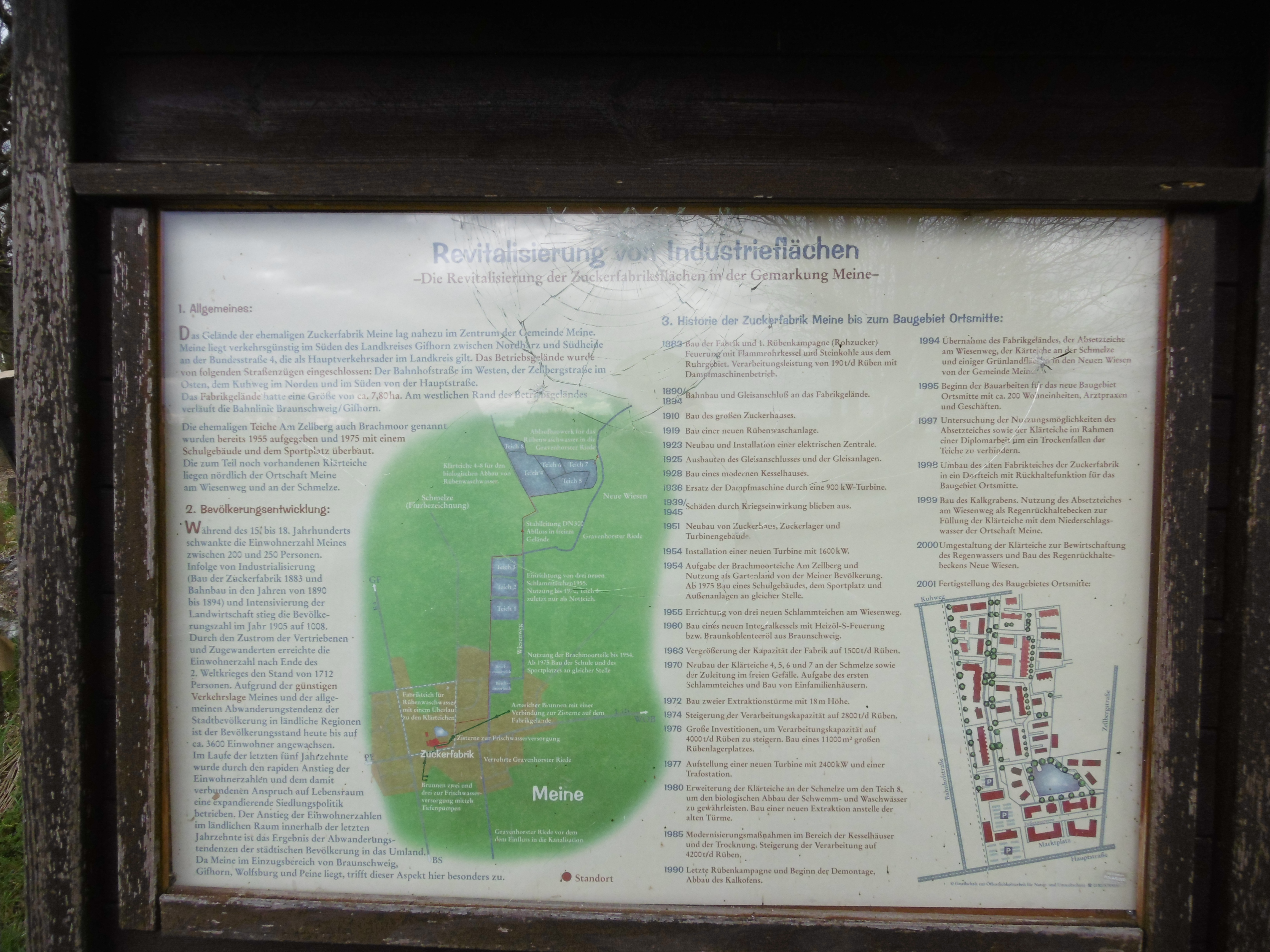 Informationstafel der Gesellschaft für Natur- und Umweltschutzan den ehemaligen Klärteichen der Zuckerfabrik Meine